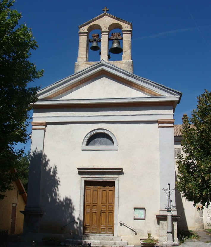 L'église d eSaint-Pierre-d'Argençon : la façade.